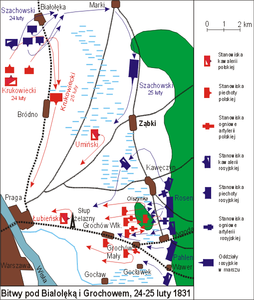 24-25 lutego 1831, mapka sytuacyjna: bitwy pod Białołęką i Grochowem. Autor: Wikipedysta:Pasiaczek, maj 2006.